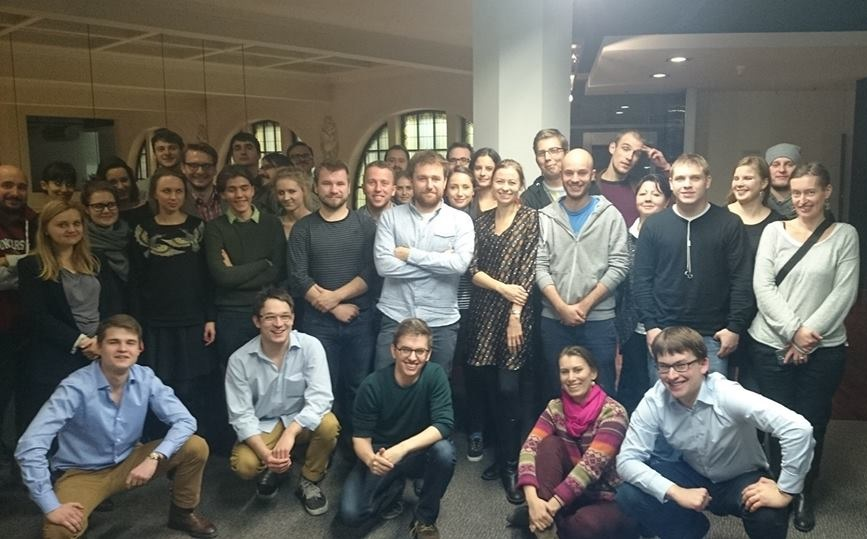 Członkowie Miasto Jest Nasze w Marzycielach i Rzemieślnikach; w środku m.in. Jan Mencwel (z brodą) i Jan Śpiewak (łysy)